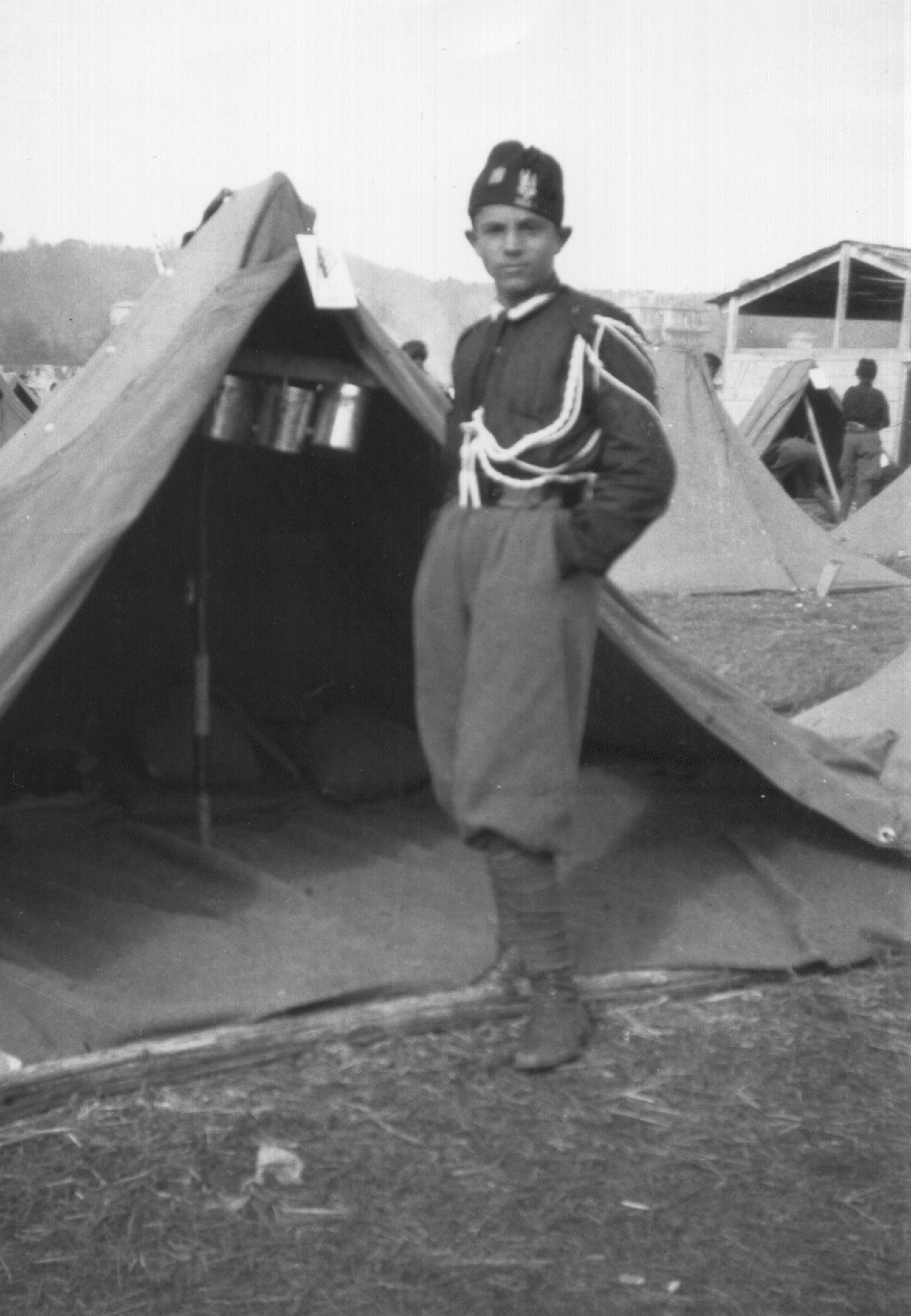 Silvio Riggio in divisa da Avanguardista (nel 1925 circa) durante il periodo fascista.